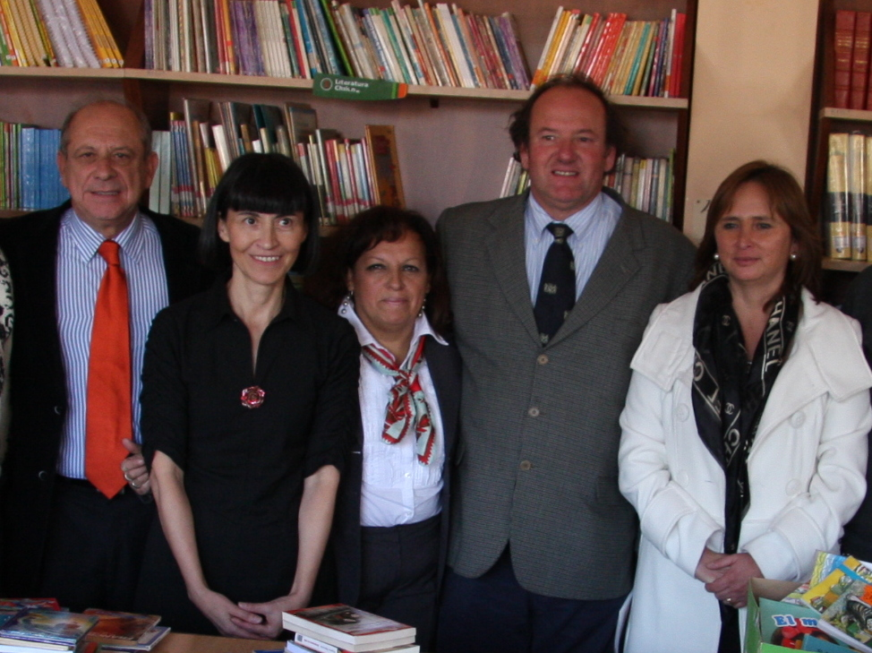 Con la presencia de los diputados de la Región de O'Higgins, José Ramón Barros y Juan Carlos Latorre, además de la alcaldesa de la comuna de Chépica, Rebeca Cofré, se realizó este viernes la ceremonia de entrega de más de 800 libros donados por la Biblioteca del Congreso Nacional (BCN) al Colegio Básico de dicha comunidad.